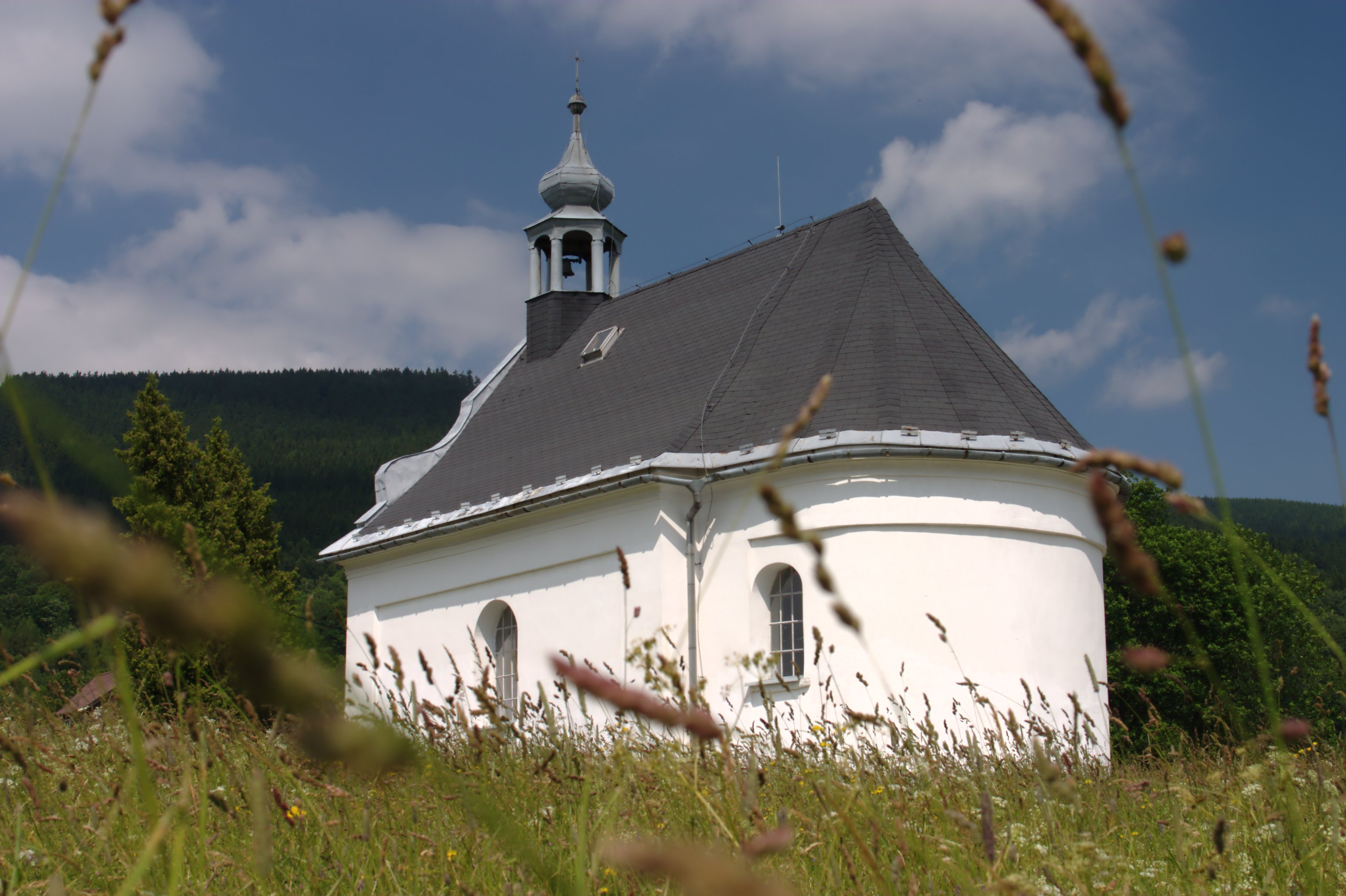 Kaple Nejsvětější Trojice (Vysoká)